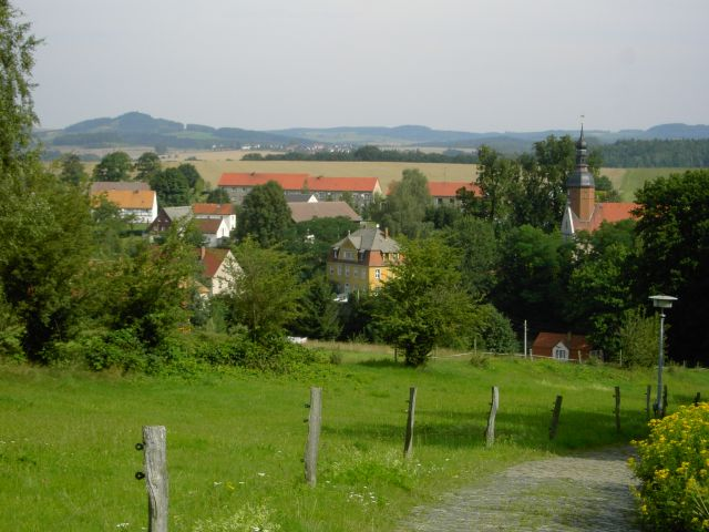 Blick vom Wolfsberg nach Reinhardtsdorf.